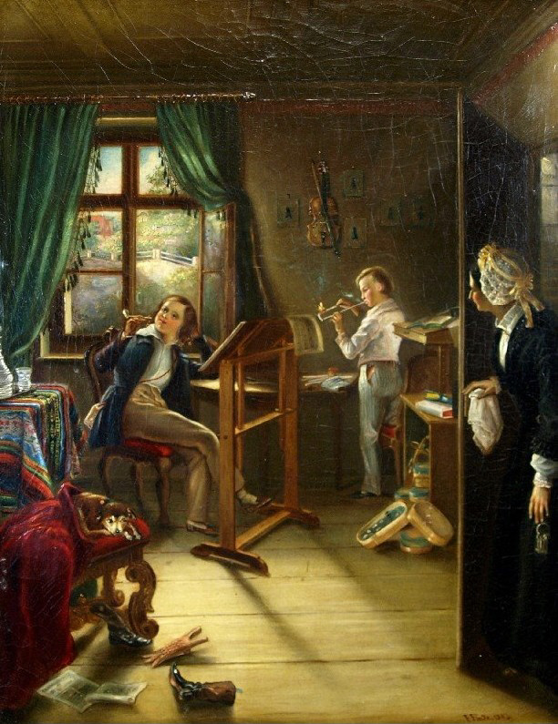 Kinder rauchen heimlich im Zimmer. Signiert. Öl auf Leinwanbd, 44 x 35 cm.